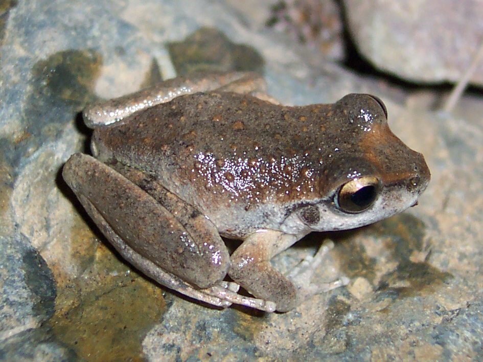 A juvenile Booroolong Frog, Litoria booroolongensis.